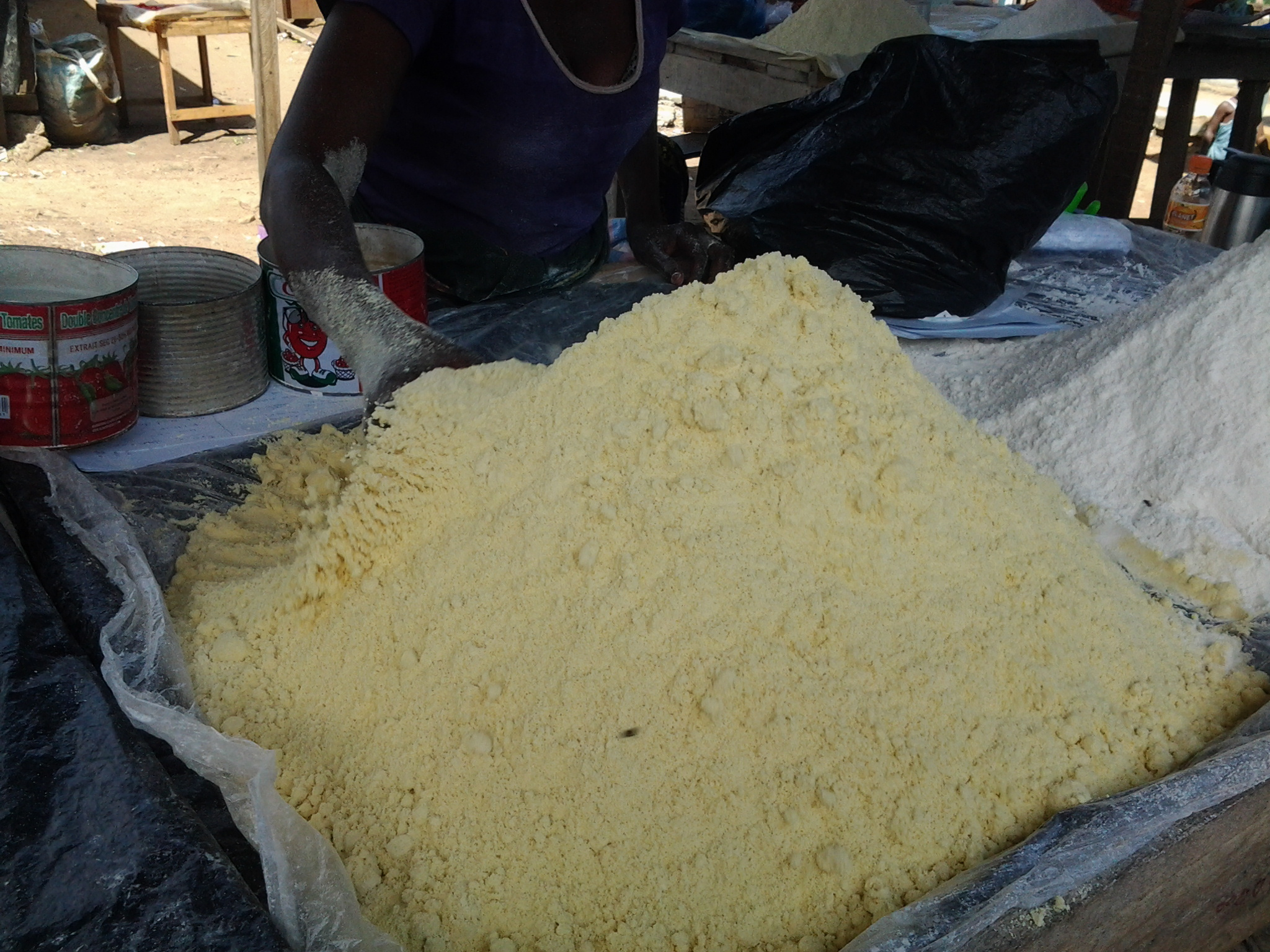 Farine de maïs en vente sur un marché d'Abidjan This is an image of food from Ivory Coast